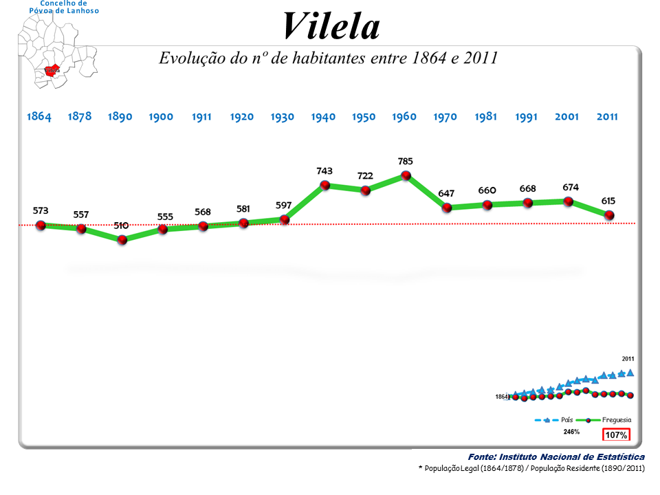 Censos 1864/2011